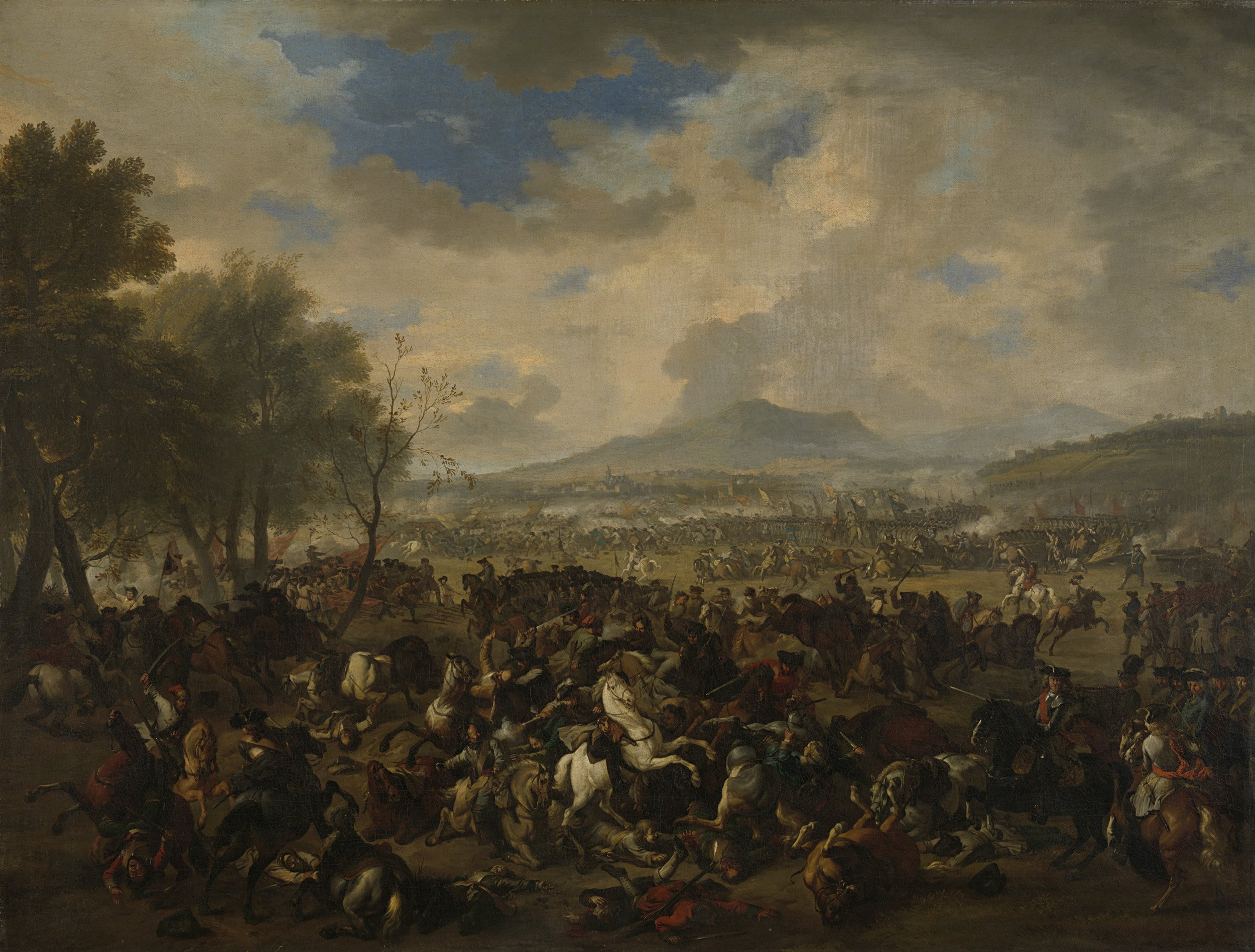 Veldslag bij Ramillies op 23 mei 1706, tussen de geallieerde troepen onder commado van Marlborough en Nassau-Ouwerkerk tegen de verenigde Franse, Spaanse en Beierse troepen onder commando van Maarschalk de Villeroy. Links enige hoge bomen, rechts op het derde plan de heuvelrug, waarop Folx-les-Caves en Jandreouille liggen en in het verschiet in de midden het plateau van Mont St. André. Op de voorgrond een ruitergevecht, dat op de linkerflank van het geallieerde leger plaats vond tegen de rechterflank van Villeroy. Rechts in de hoek een staf met vermoedelijk portret van Marlborough op een zwart paard. De ruiter op de rug gezien is misschien generaal-majoor Murray. Hij die er meer als een burger uitziet, zou misschien kunnen zijn Sicco Goslinga, de aan het geallieerde leger toegevoegde gedeputeerde van de Staten-Generaal. Links van het midden, vlak achter het grote ruitergevecht, voert geallieerde cavalerie en charge uit tegen de infanteristen van de beide kronen, die hen met gevelde pieken opwachten. Meer naar achteren valt de hoofdmacht van de Geallieerden, onder commando van Lord Orteney, het centrum van de Frans-Spaans-Beierse linies, onder Villeroy en keurvorst Maximiliaan Emanuel van Beiren, aan, die te Ramillies en verder naar het noorden, bij Offus en Autreglise (Anderkerk) opgesteld stonden.